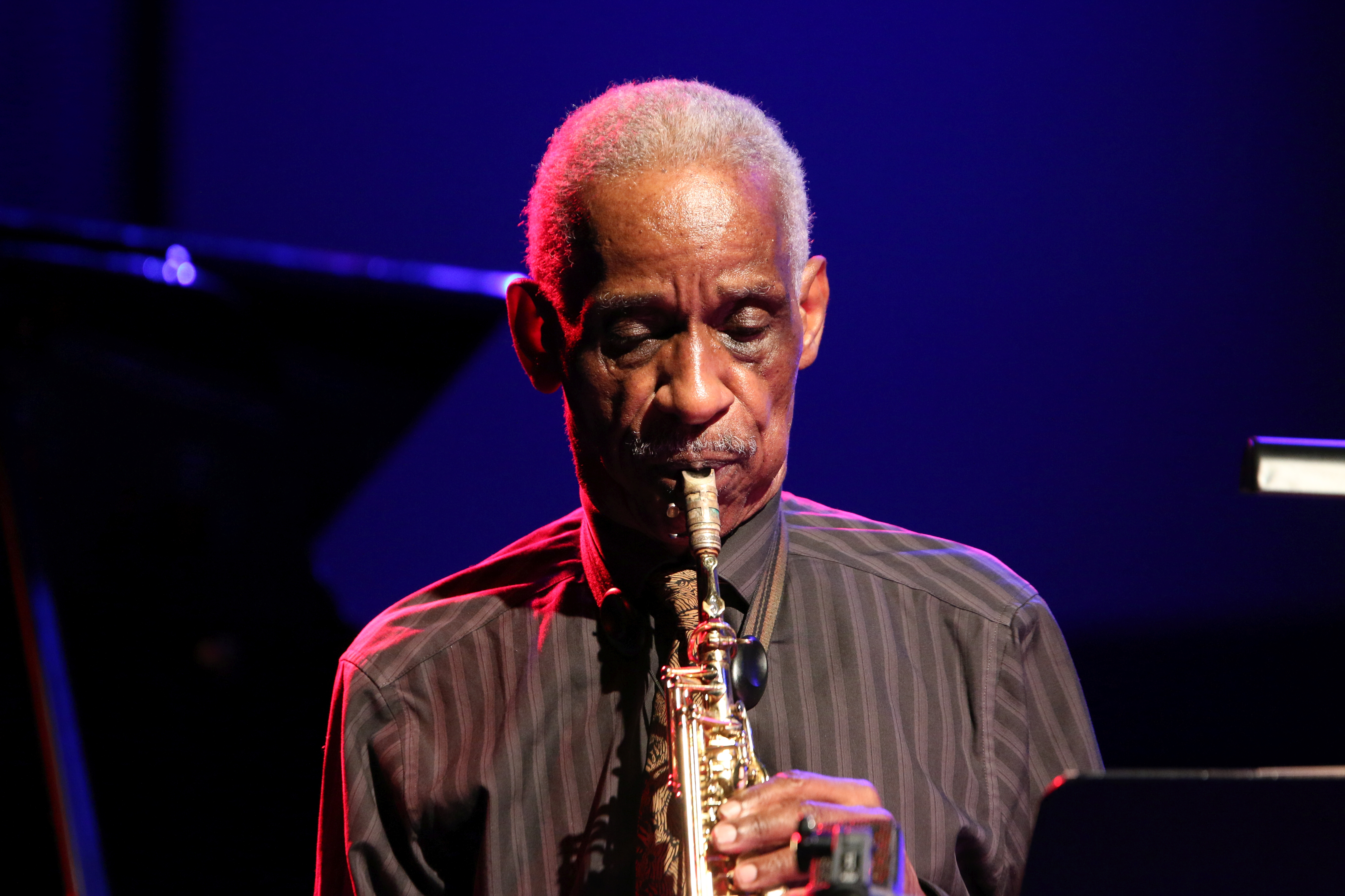 46. Deutsches Jazzfestival Frankfurt 2015: Roscoe Mitchell